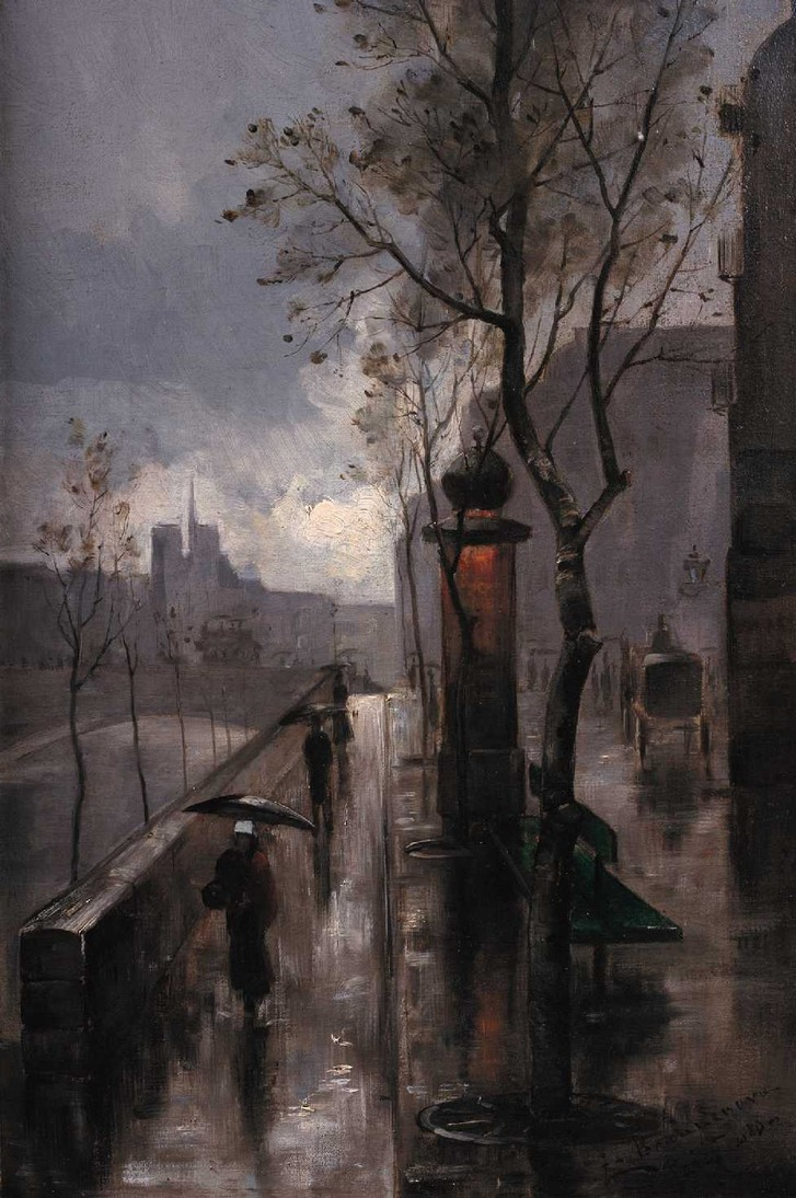 Zdenka Brauerová - Z Paříže